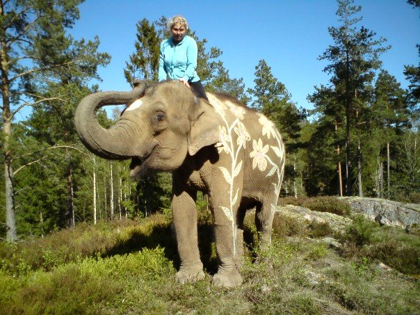 Susanne Päivärinta rider på elefanten Saonoi i Kolmårdens djurpark.